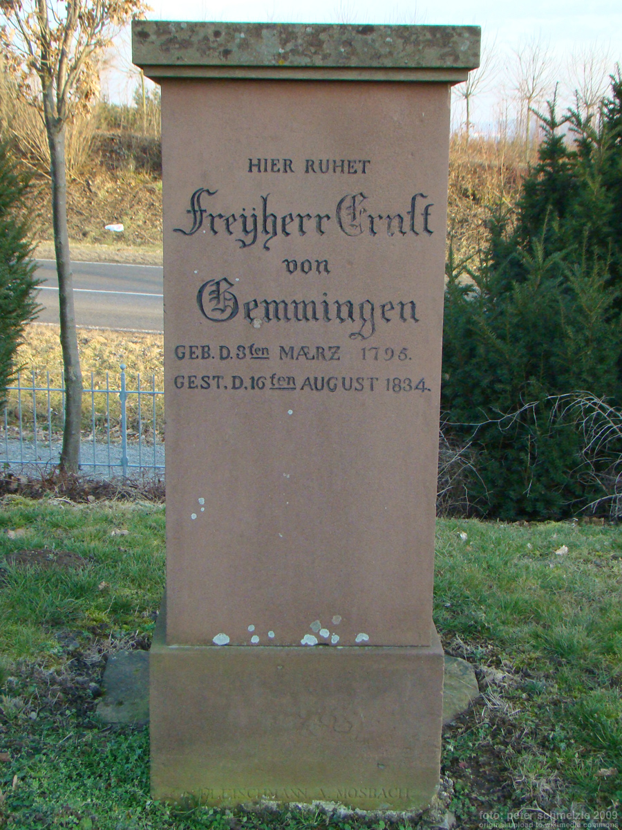 Grabmal von von Freiherr Ernst von Gemmingen (1795-1834) in der Familiengrablege der Freiherren von Gemmingen in Bad Rappenau-Babstadt